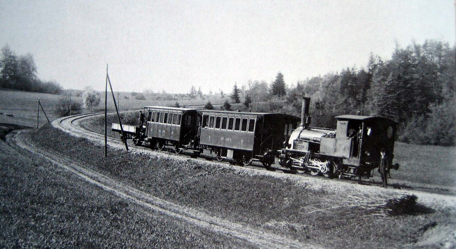 mit Dampf betriebene Üetlibergbahn, um 1910